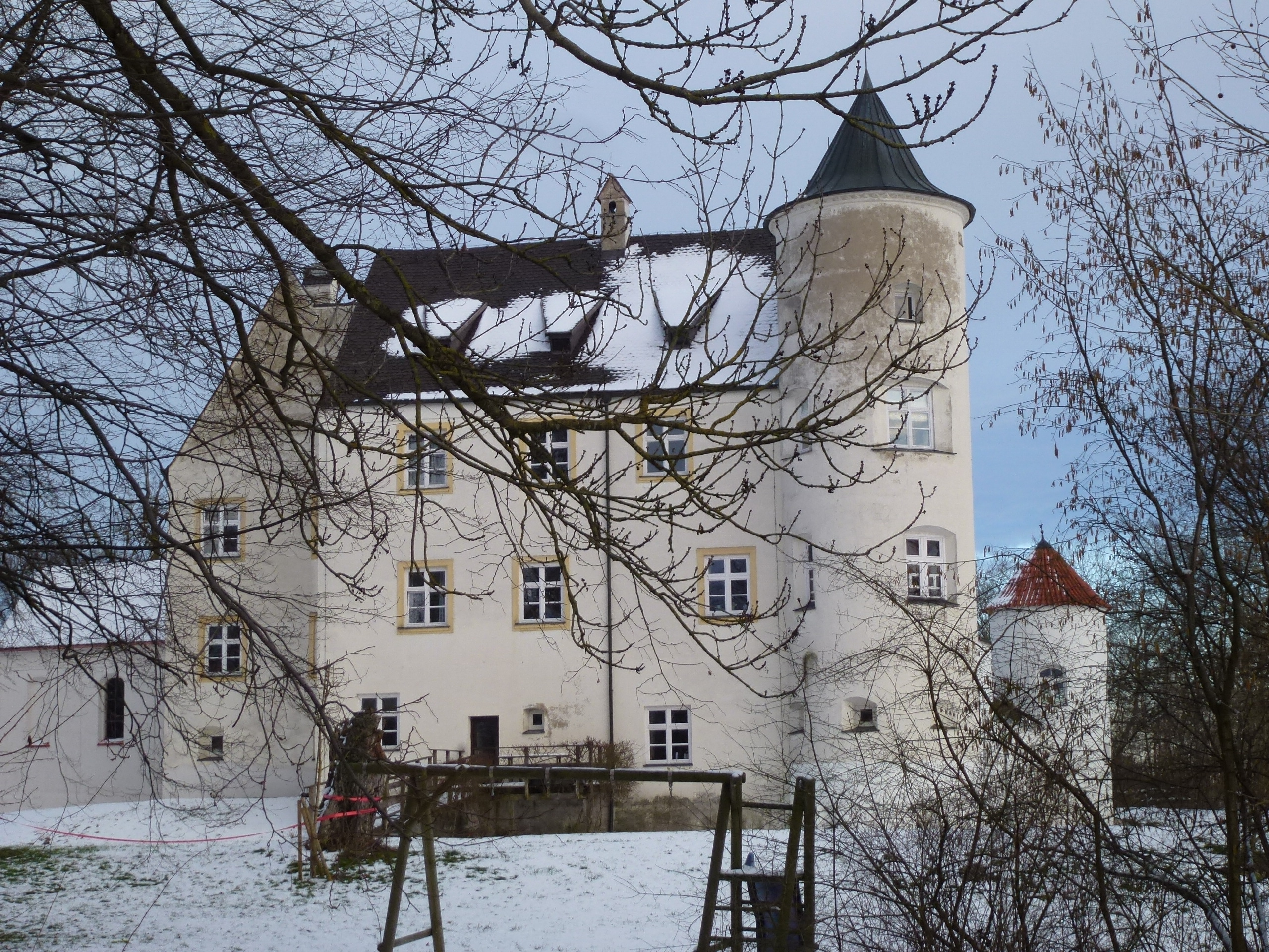 Bergkirchen - OT Lauterbach Am Schloßberg 6 -: Schloß, Ansicht von W